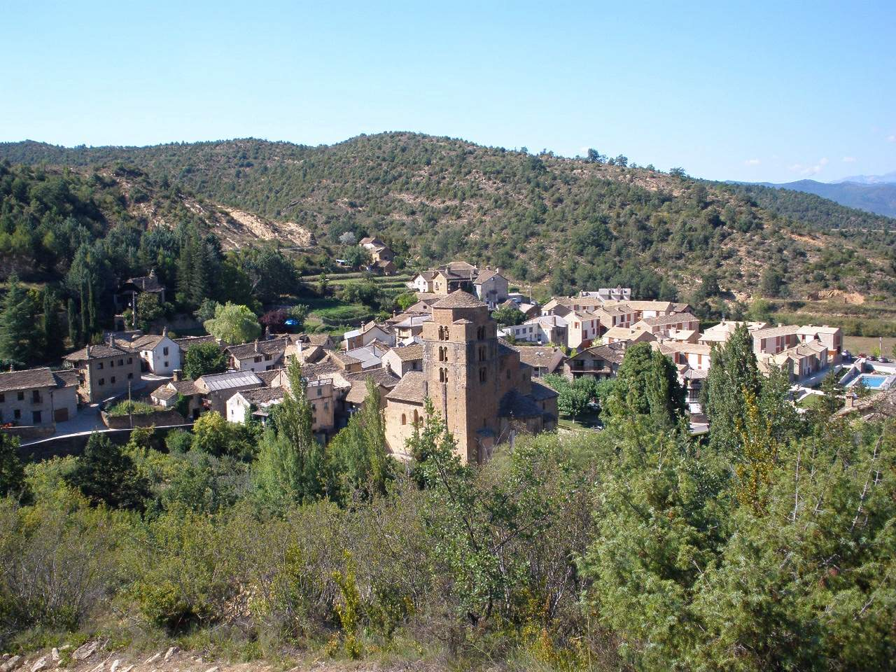 Santa Cruz de la Serós (Huesca)